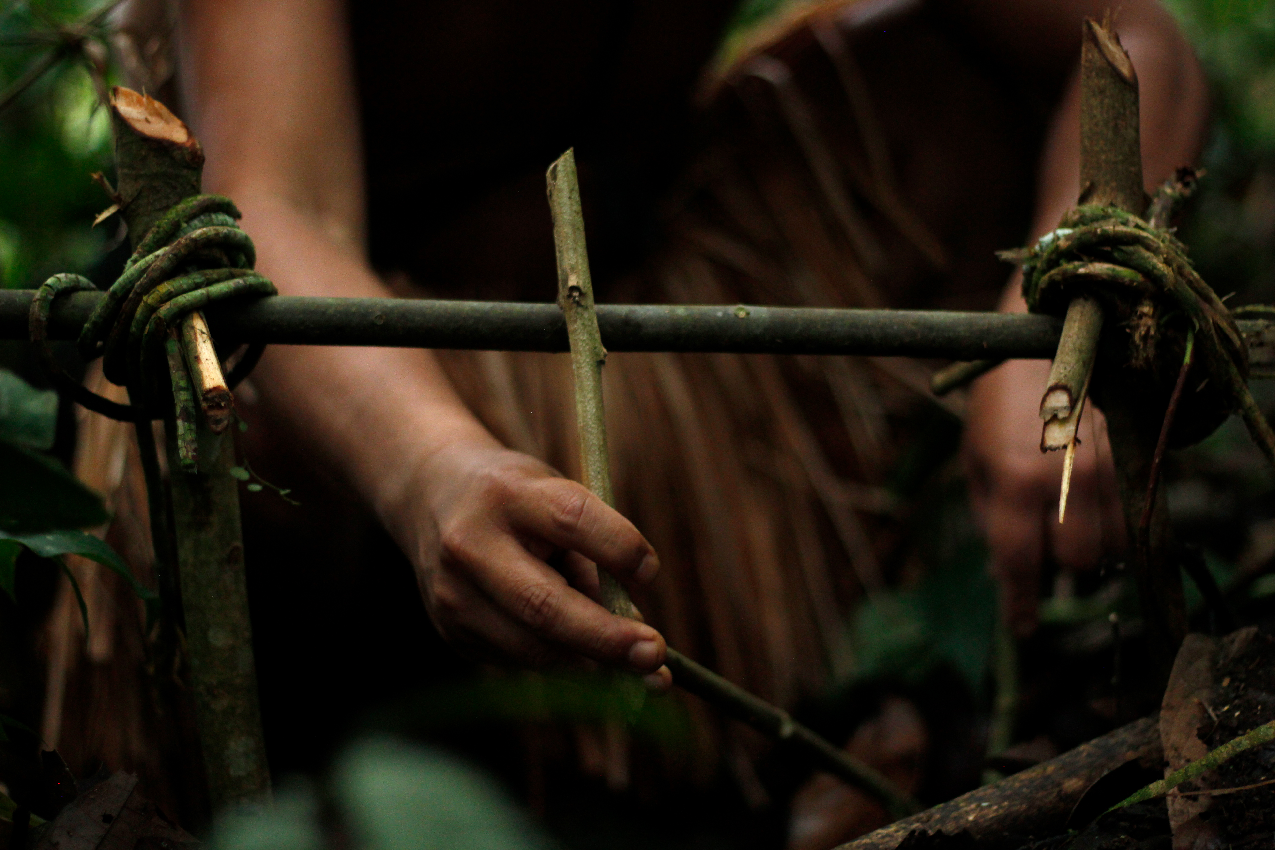 demostración de cómo se arma una trampa para capturar aves